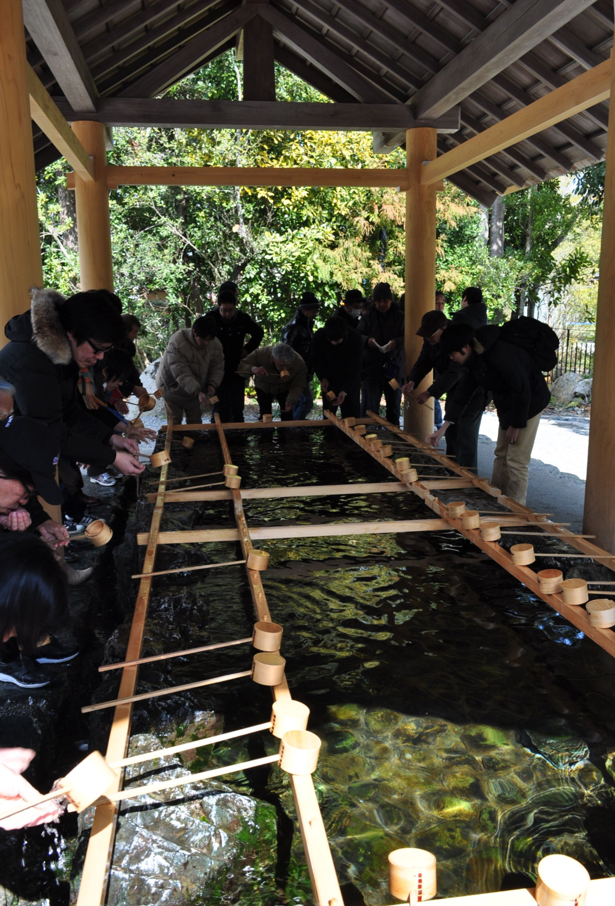 伊勢神宮 外宮 手水舎